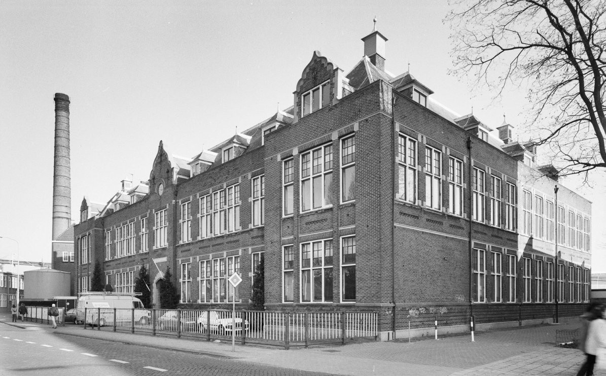 Wilhelminaschool: Overzicht voorgevel en rechter zijgevel en schoorsteenpijp (opmerking: Gefotografeerd voor Monumenten In Nederland Overijssel)